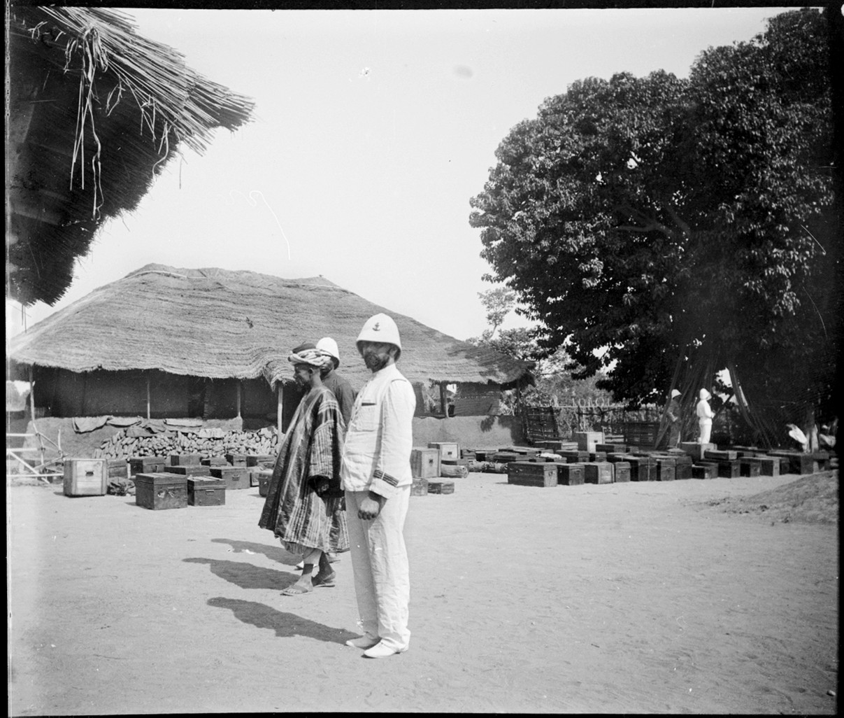 Le sultan Ahmadou avec un officier français, s.l., s.d. Photographie d'Henri Gaden